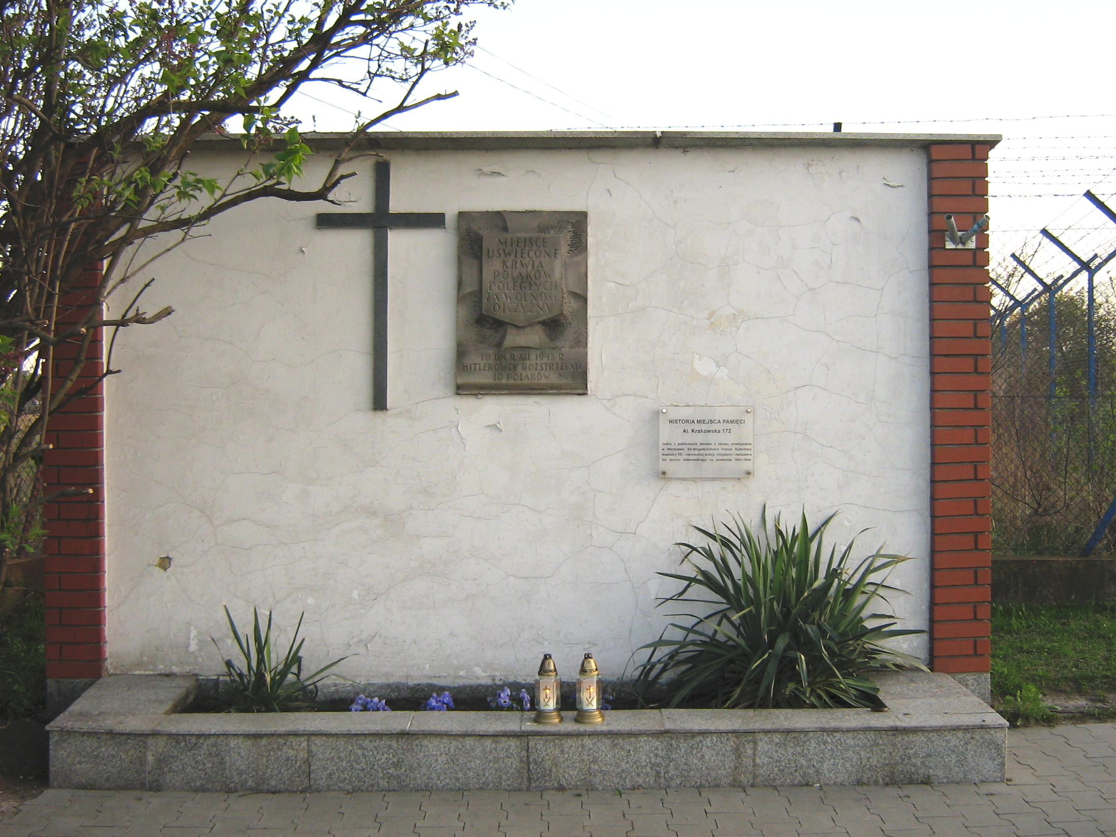 Tablica na murze po domu przy al. Krakowskiej 172 w Warszawie upamiętniająca rozstrzelanie 10 Polaków przez Niemców 9 grudnia 1943 r.